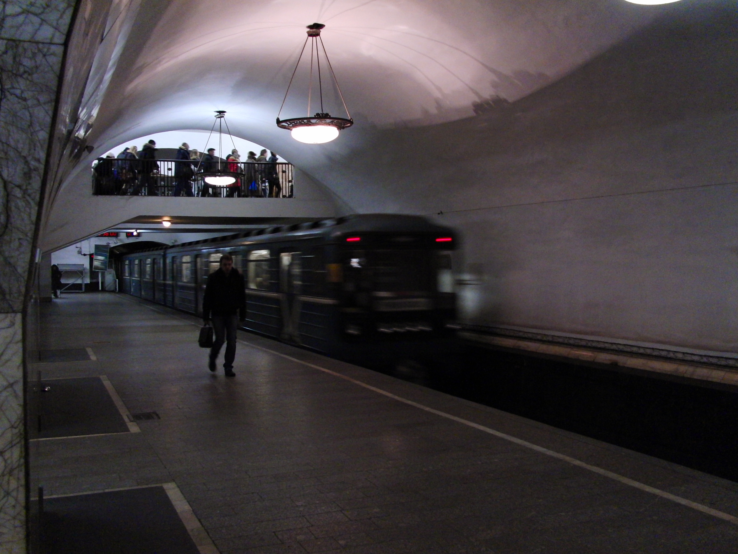 Novokuznetskaya (Новокузнецкая)